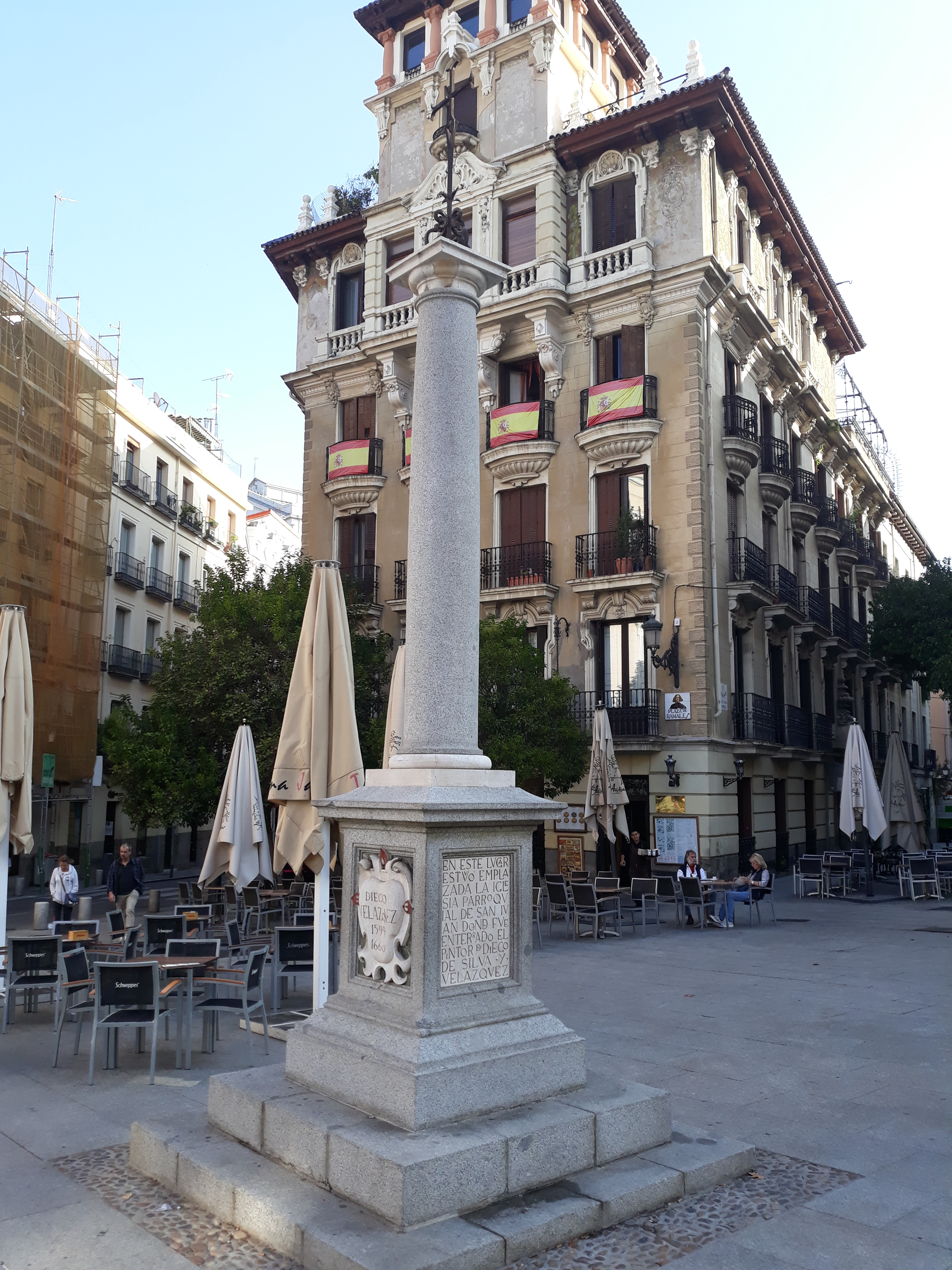 Gedenksäule für das Gab des spanischen Malers Diego Velazquez in der abgerissenen Kirche San Juan auf der Plaza de Ramales in Madrid.